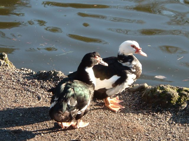 Ducks: At Laurelhurst Park.